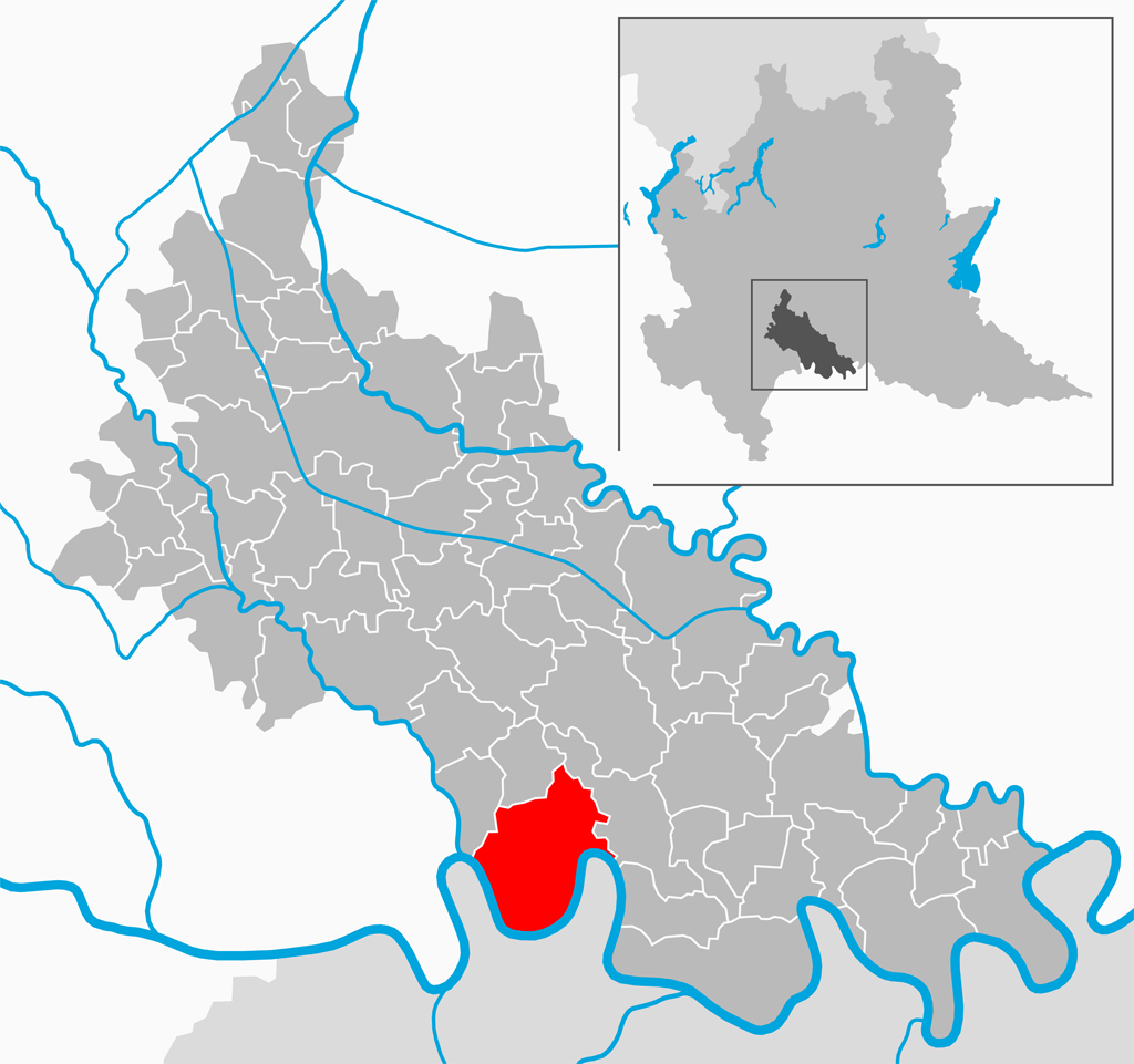 Il comune di Senna Lodigiana nella provincia di Lodi